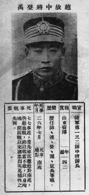 抗戰軍人忠烈錄第一輯中的烈士遺像